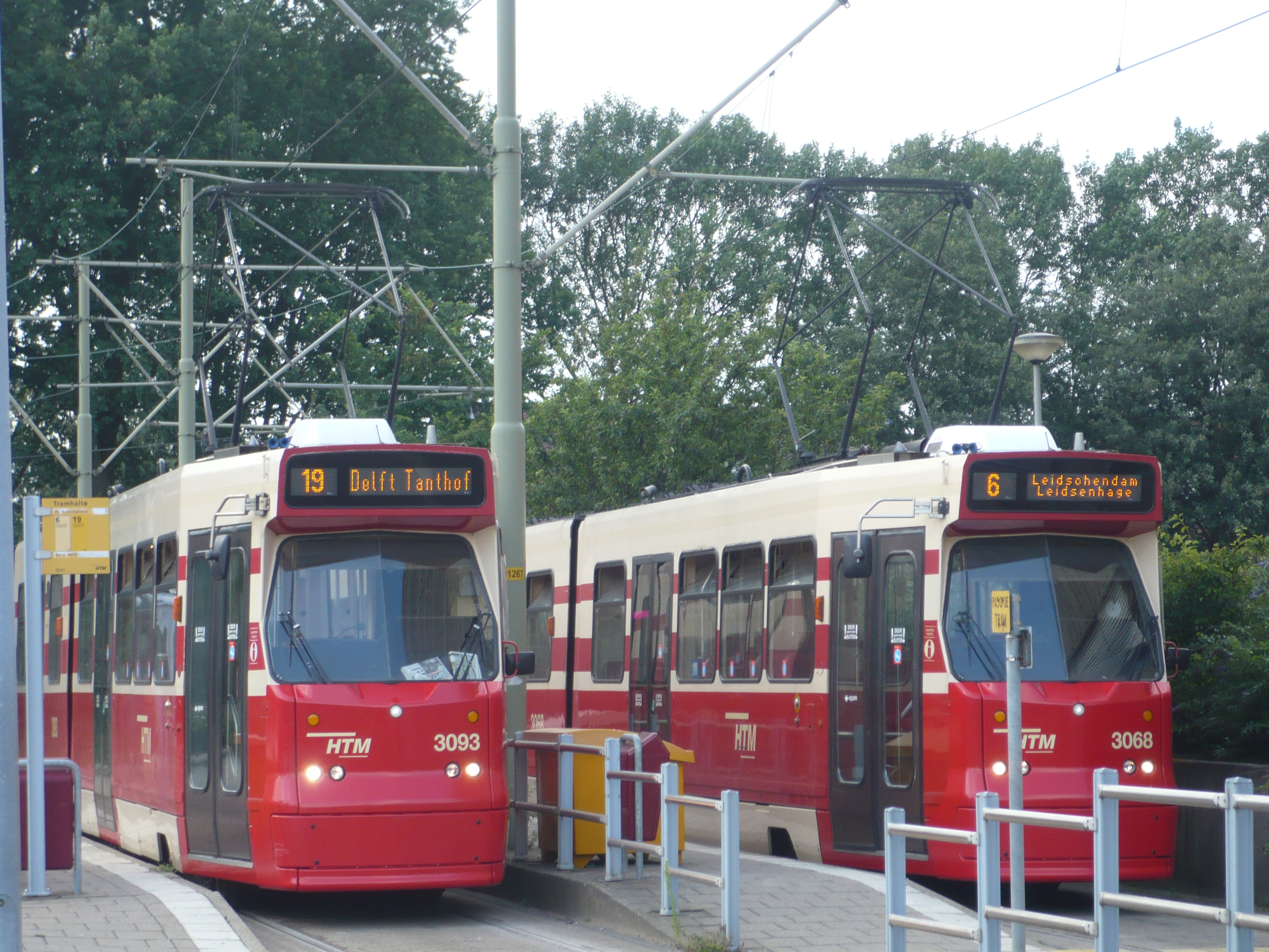 Een tram van HTM van tramlijn 19 richting Delft Tanthof en tramlijn 6 richting Leidschendam Leidsenhage. Locatie: MCH Antoniushove.